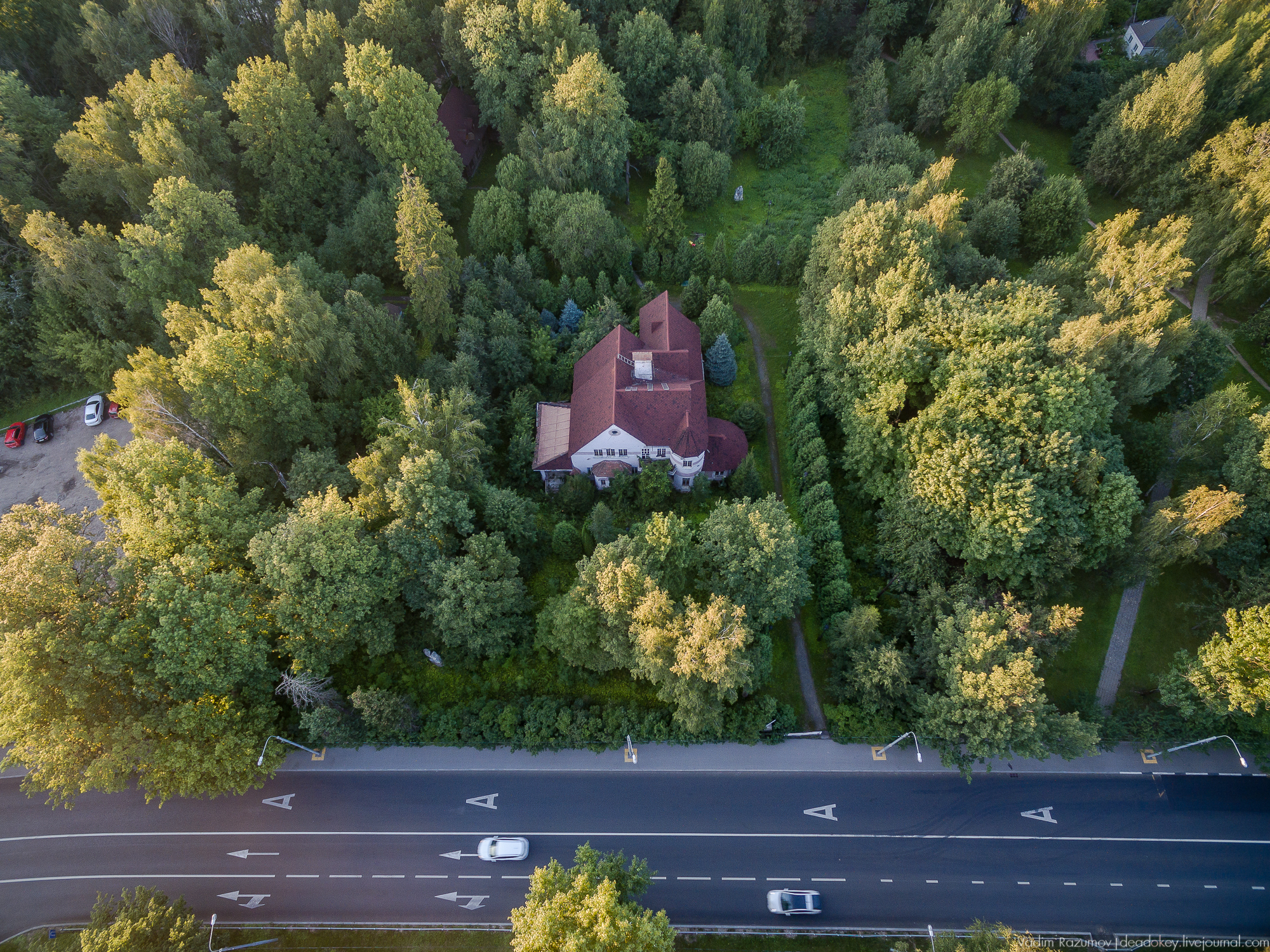 Лианозово, г. Москва. Музей Константина Васильева.